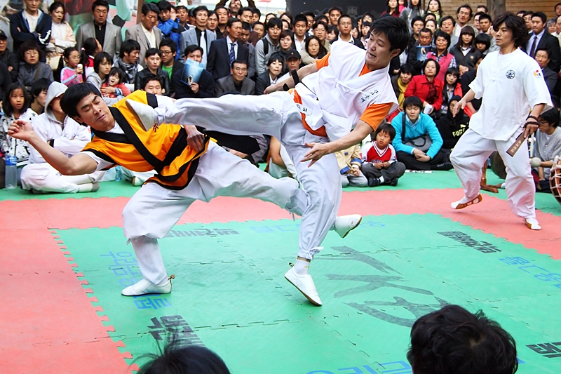 2009 택견배틀에서 이천희(경기대 아리쇠)가 박현수(서울 종로 장산곶매)의 발따귀를 피하면서 엎어치기로 디딤발을 차고 있다. 이천희 승.